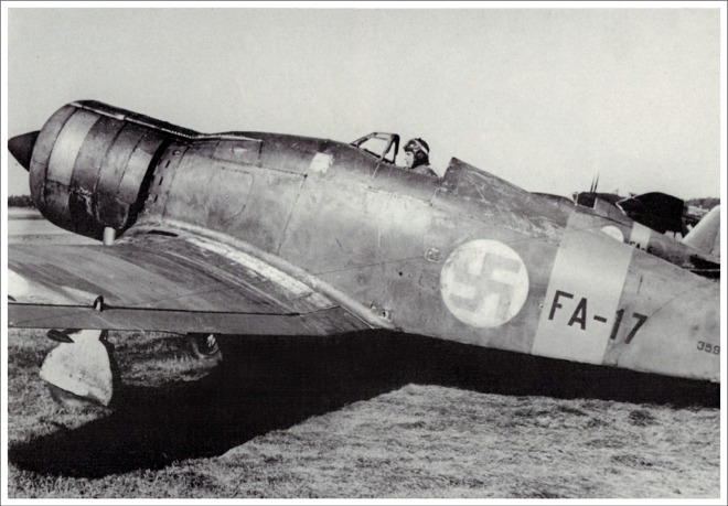 FIAT G.50 II serie - Aeronautica Finlandese